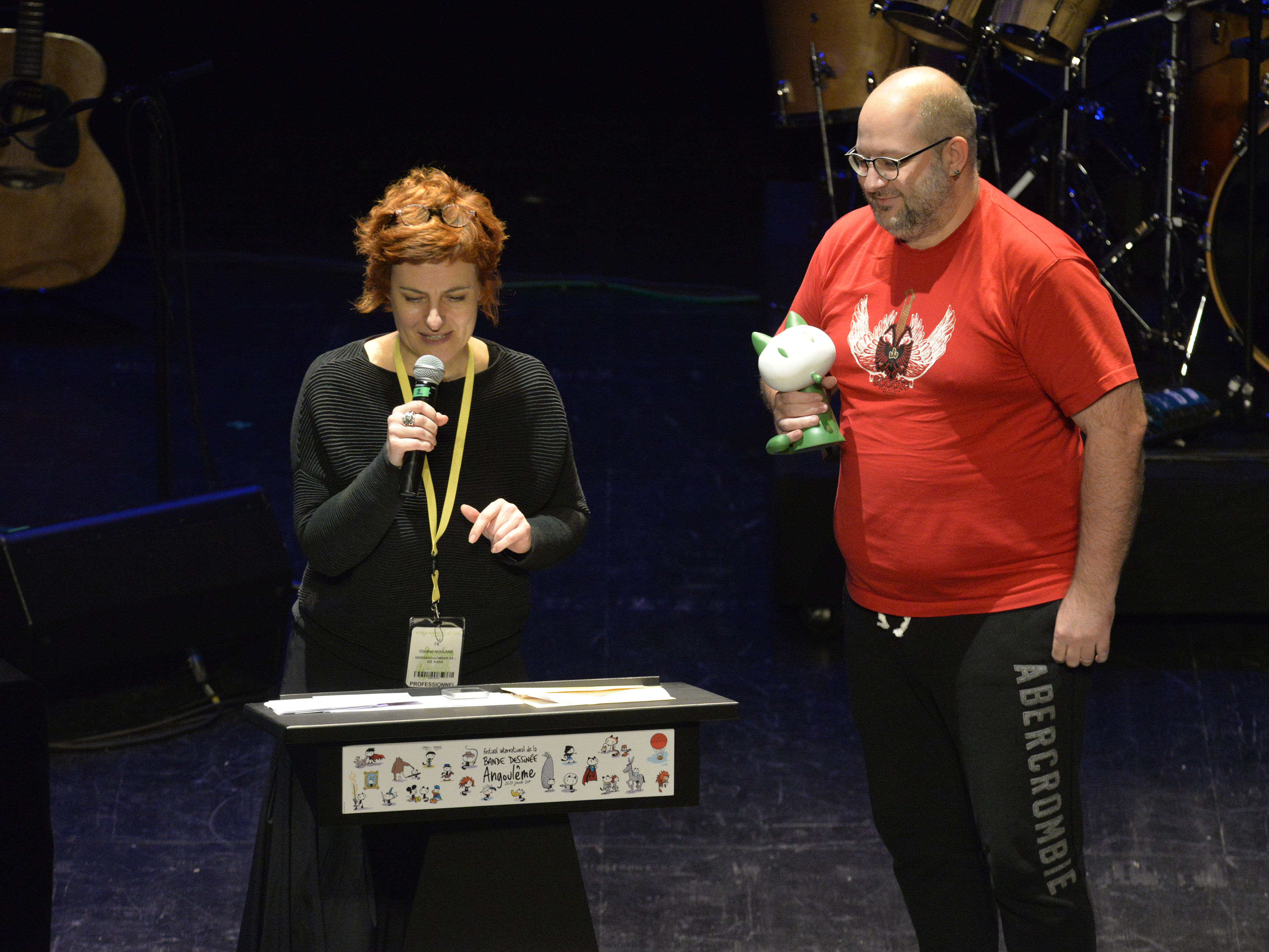 Christel Hoolans, l'éditrice de Kazuo Kamimura (1940-1985), reçoit le fauve du patrimoine des mains de Jean-David Morvan, membre du jury au Festival International de la Bande Dessinée d'Angoulême 2017.